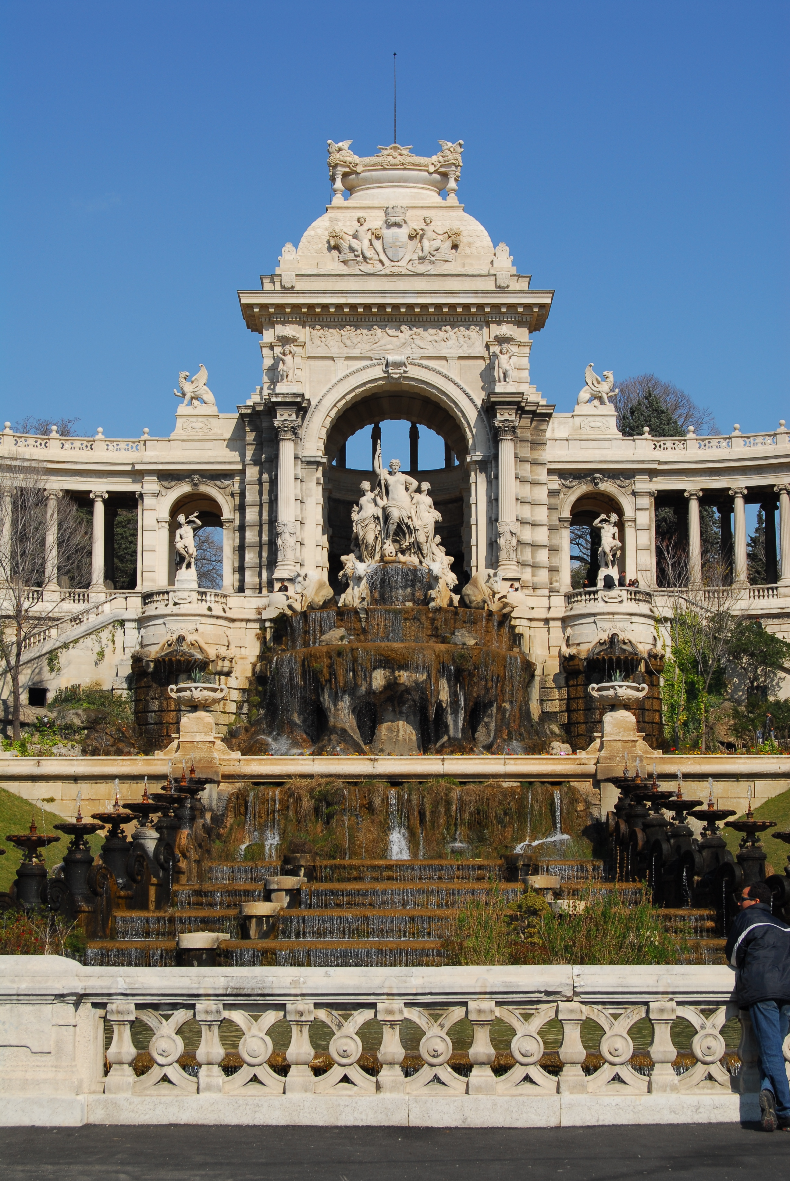 Das Palais Longchamp in Marseille, Frankreich.